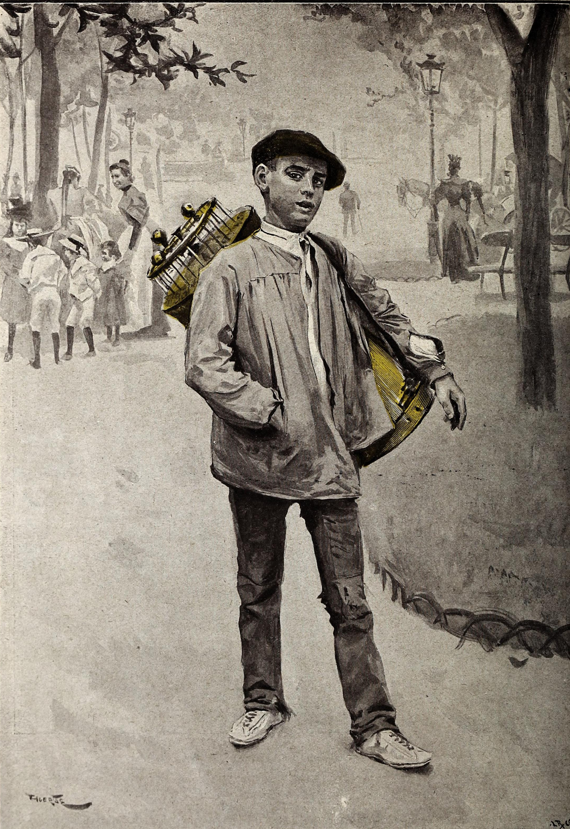 Un barquillero.